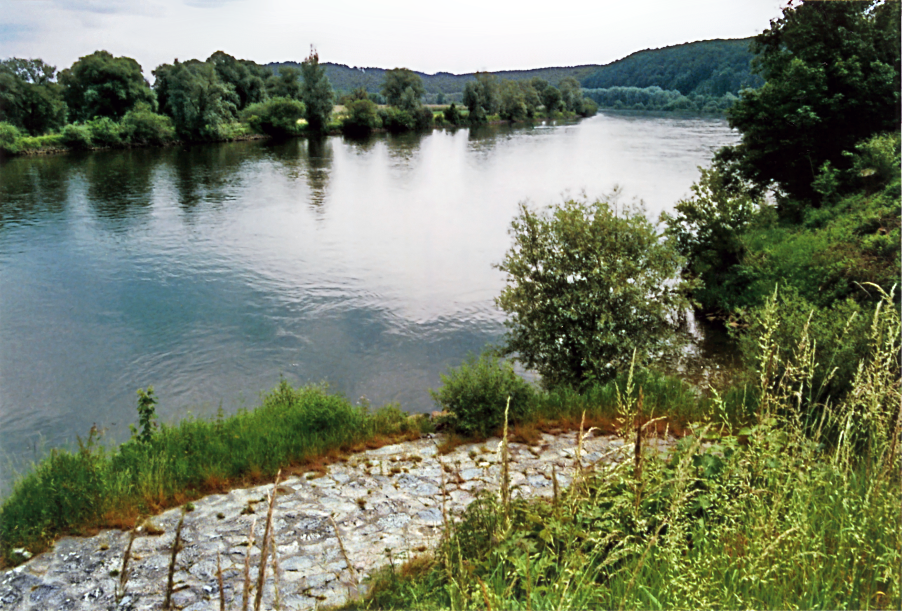 Der Burgus Untersaal ist ein ehemaliger römischer Militärstandort (Burgus), der für die Kontrolle eines Abschnitts der Reichsgrenze entlang des Donau-Iller-Rhein-Limes zuständig war. Die archäologisch ergrabenen, heute jedoch nicht mehr sichtbaren Überreste befanden sich nahe dem Kirchdorf Untersaal bei Saal an der Donau östlich der Kreisstadt Kelheim in Niederbayern. Das Bild zeigt den ehemaligen Standort am Zufluß des Feckinger Bachs in die Donau. Aufnahme vom 14. Juni 2015.